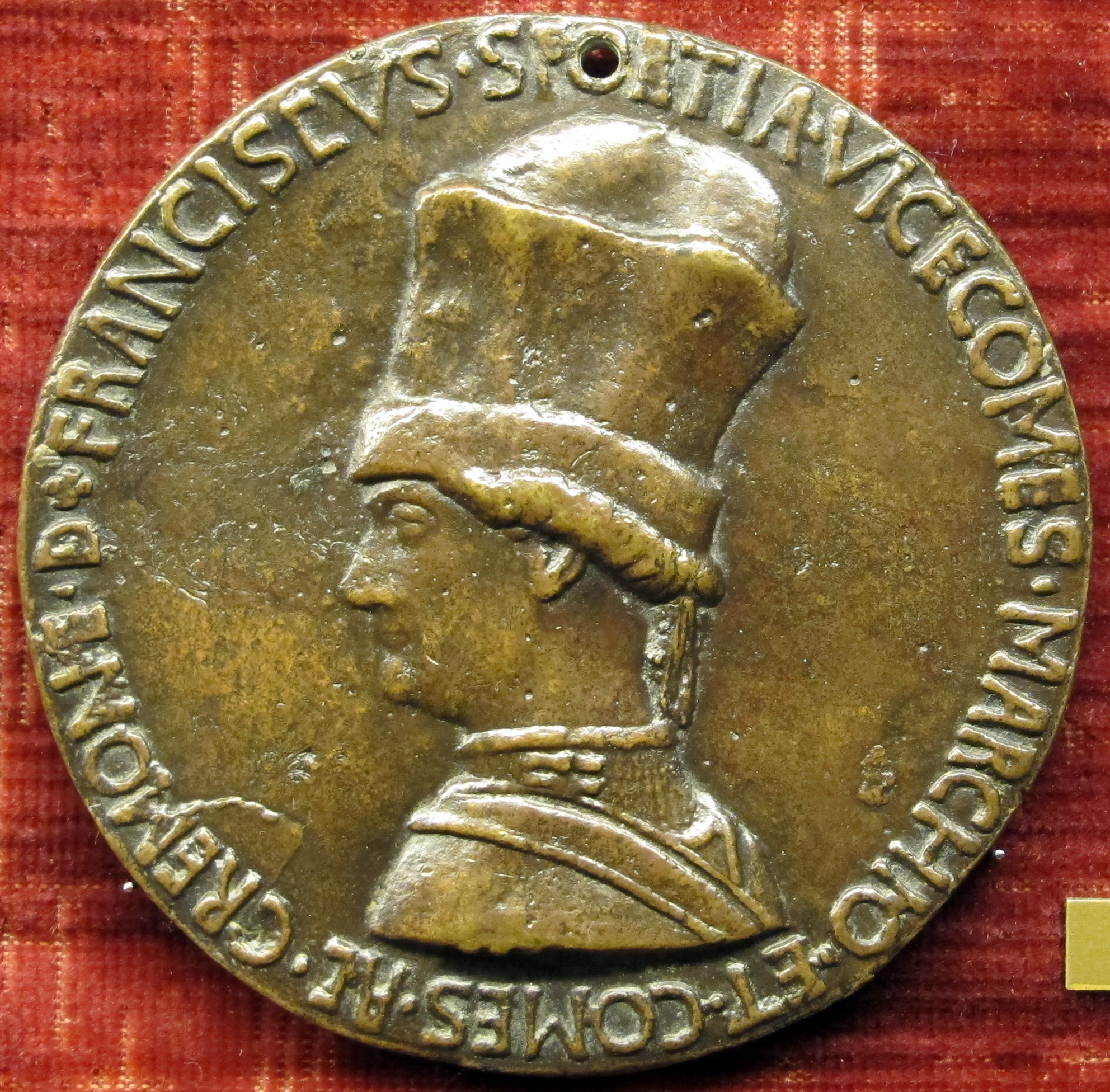 Medaglia di Francesco Sforza, recto